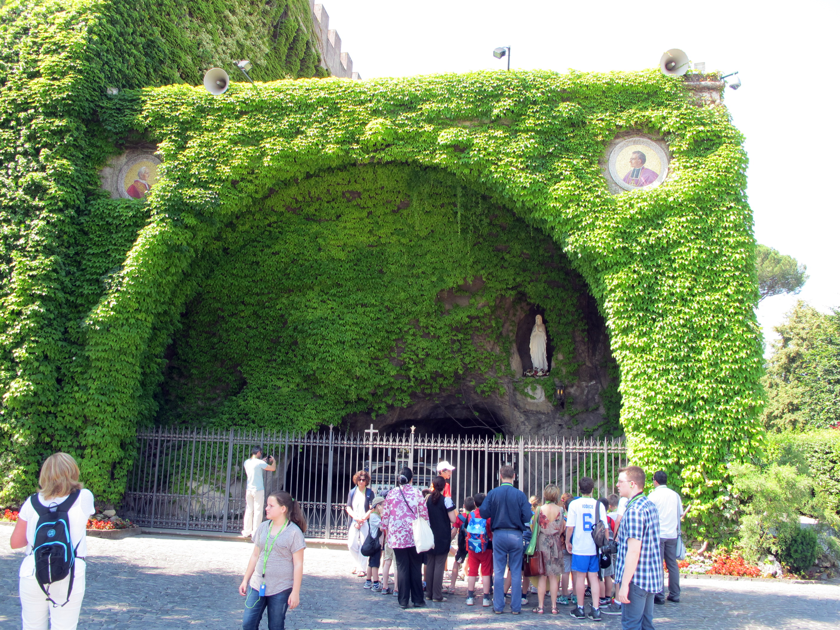 Giardini Vaticani